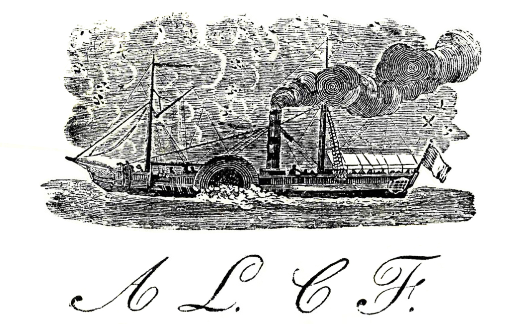 Famille Courmes, armateur grassois